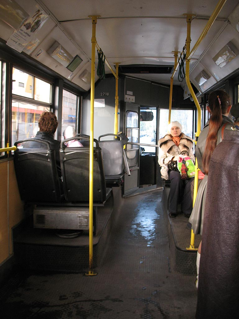 Москва, троллейбус ТролЗа-527500 №2718, салон.